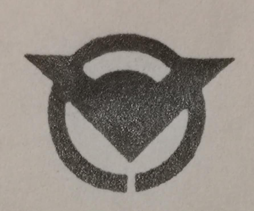 2004年に合併により廃止された丹後町（現・京丹後市丹後町）の町章